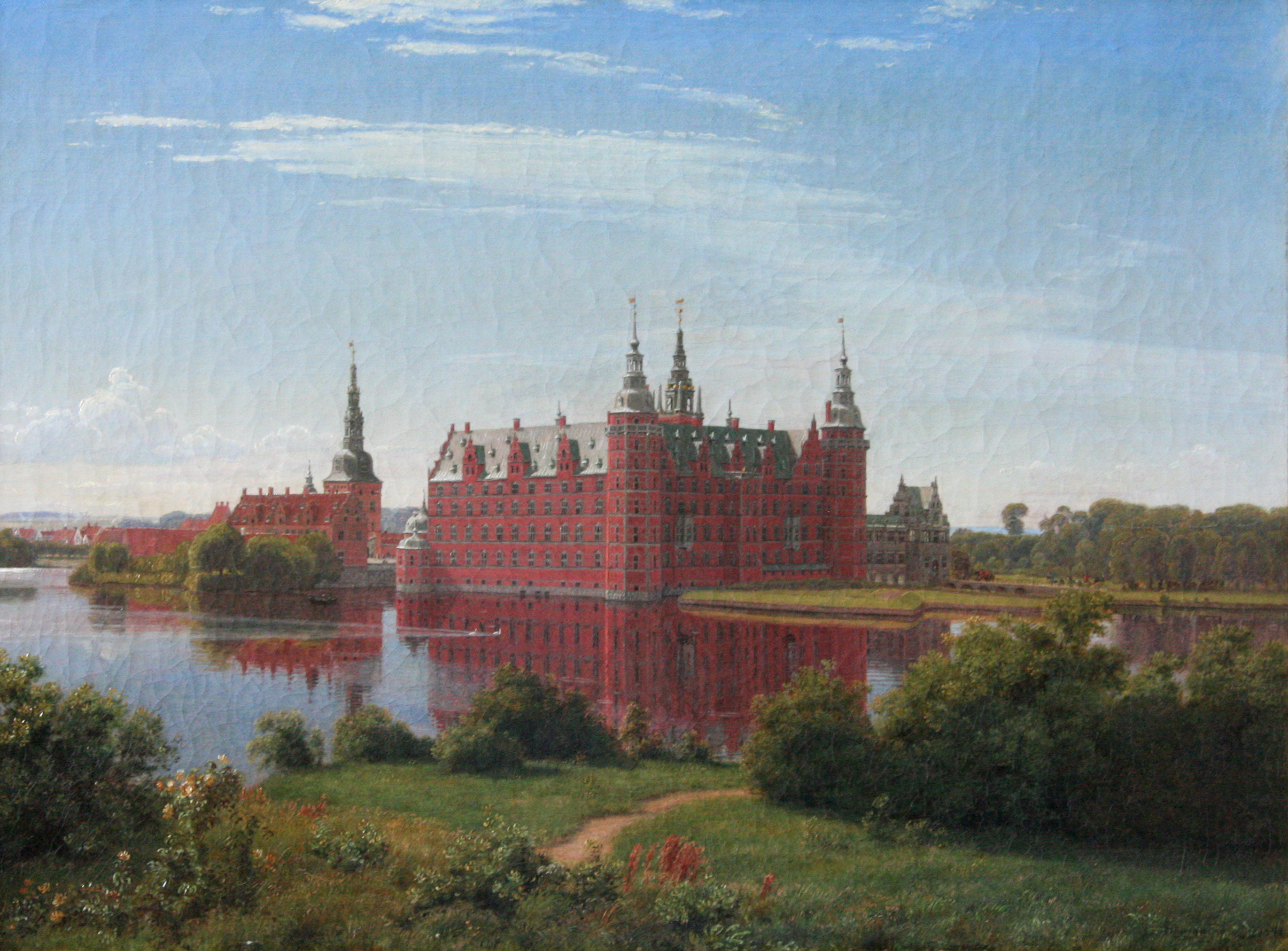 Frederiksborg Palace